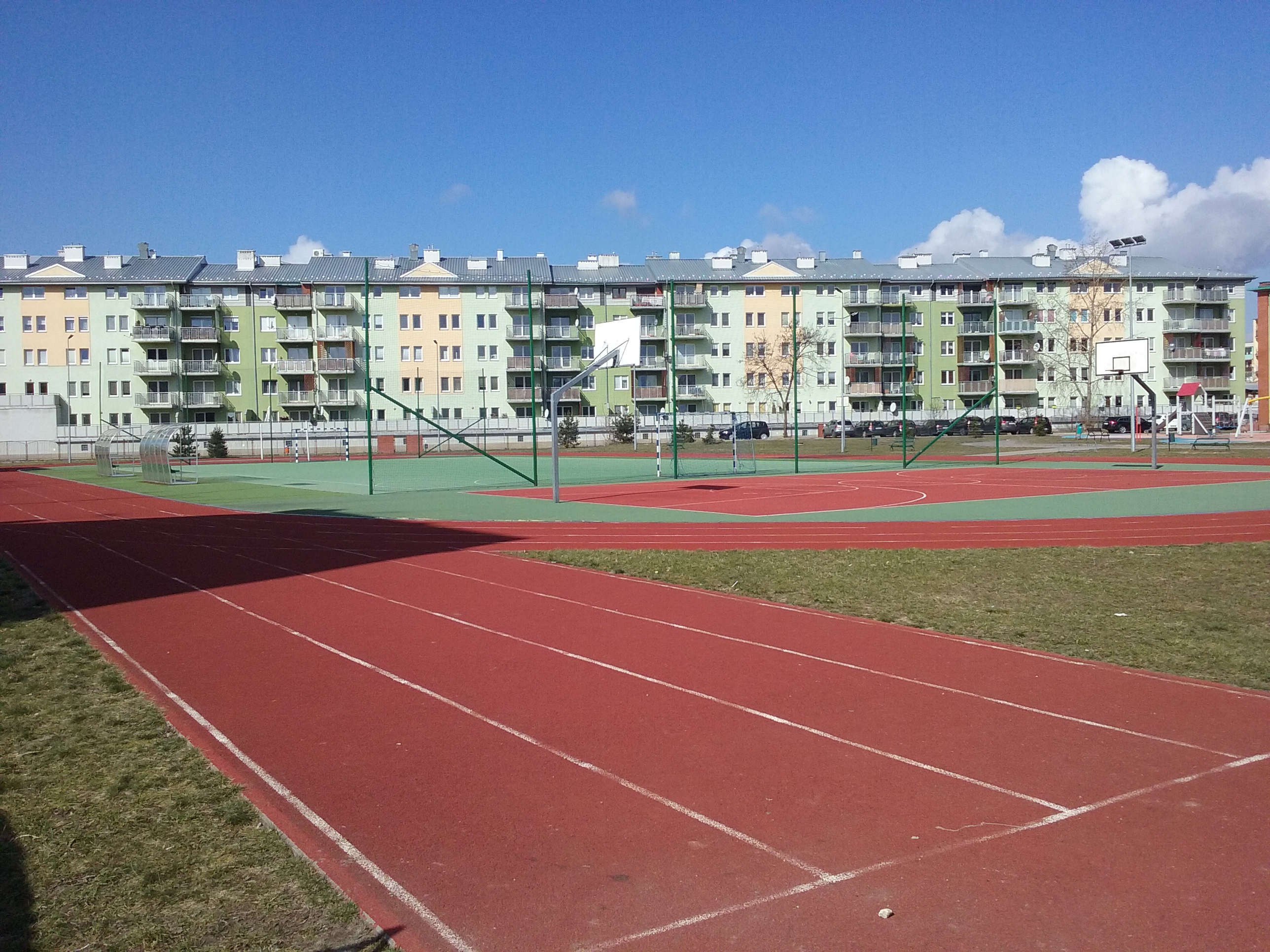 Tomaszów Mazowiecki, ogólnodostępne boiska do gry w piłkę nożną, koszykówkę i bieżnie lekkoatletyczne przy Szkole Podstawowej nr 1